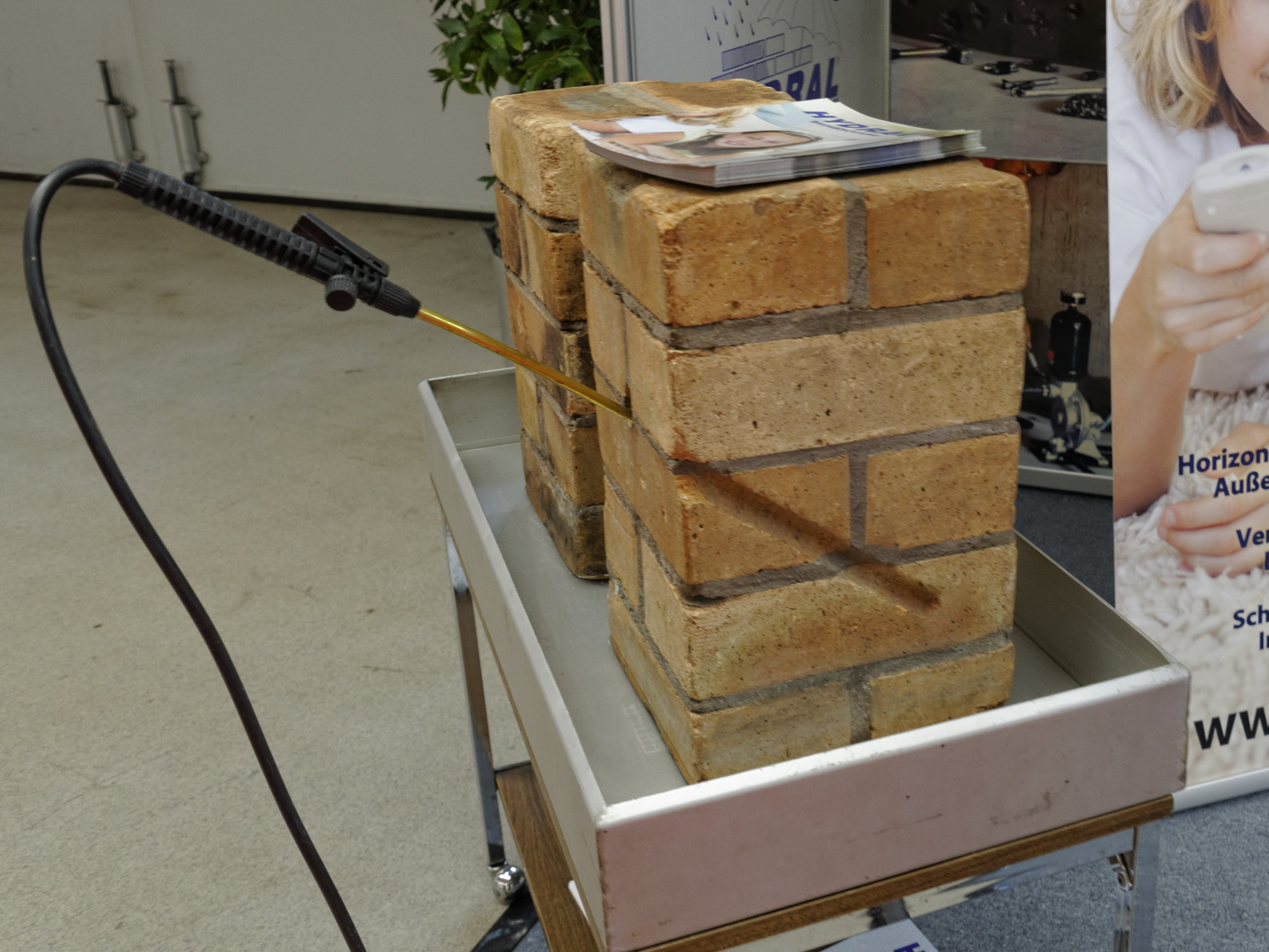 Sindelfingen Haus & Energie 2018